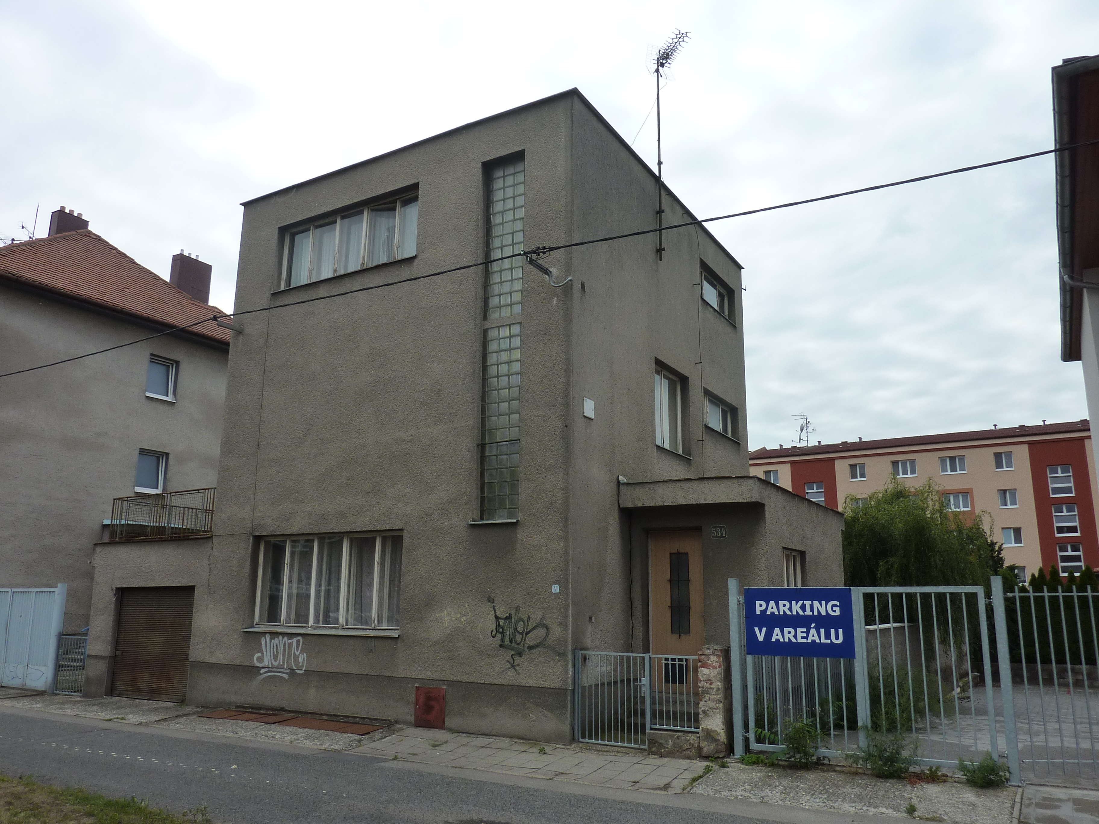 Rodinný dům (Uherské Hradiště), Malinovského 534, Uherské Hradiště. Dle sdělení oddělení architektury městského úřadu v Uherském Hradišti z 24.09.2012 jde o „doklad hodnotné funkcionalistické architektury architekta Františka Lydie Gahury“.